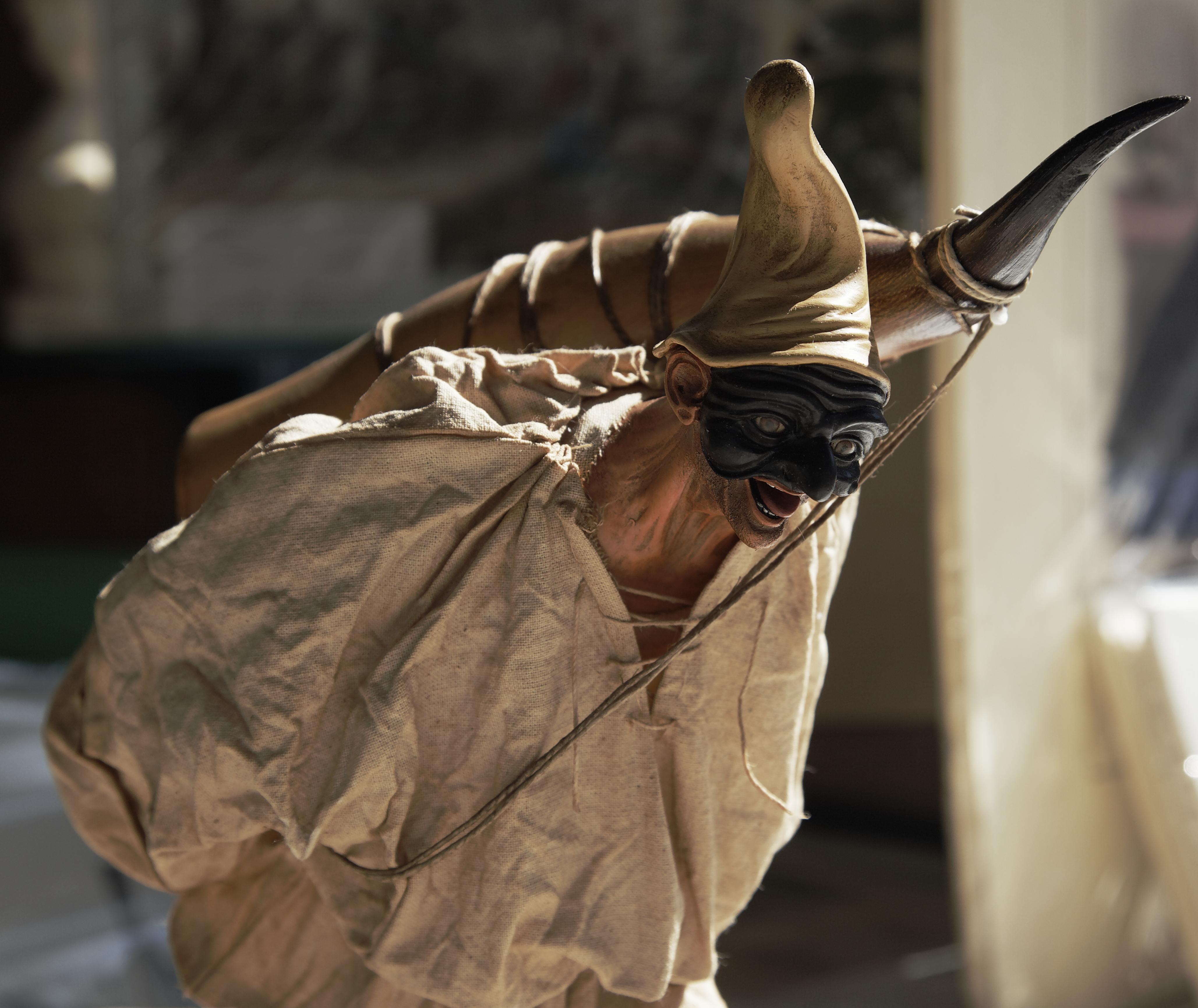 La maschera di Pulcinella, Napoli - Italia.